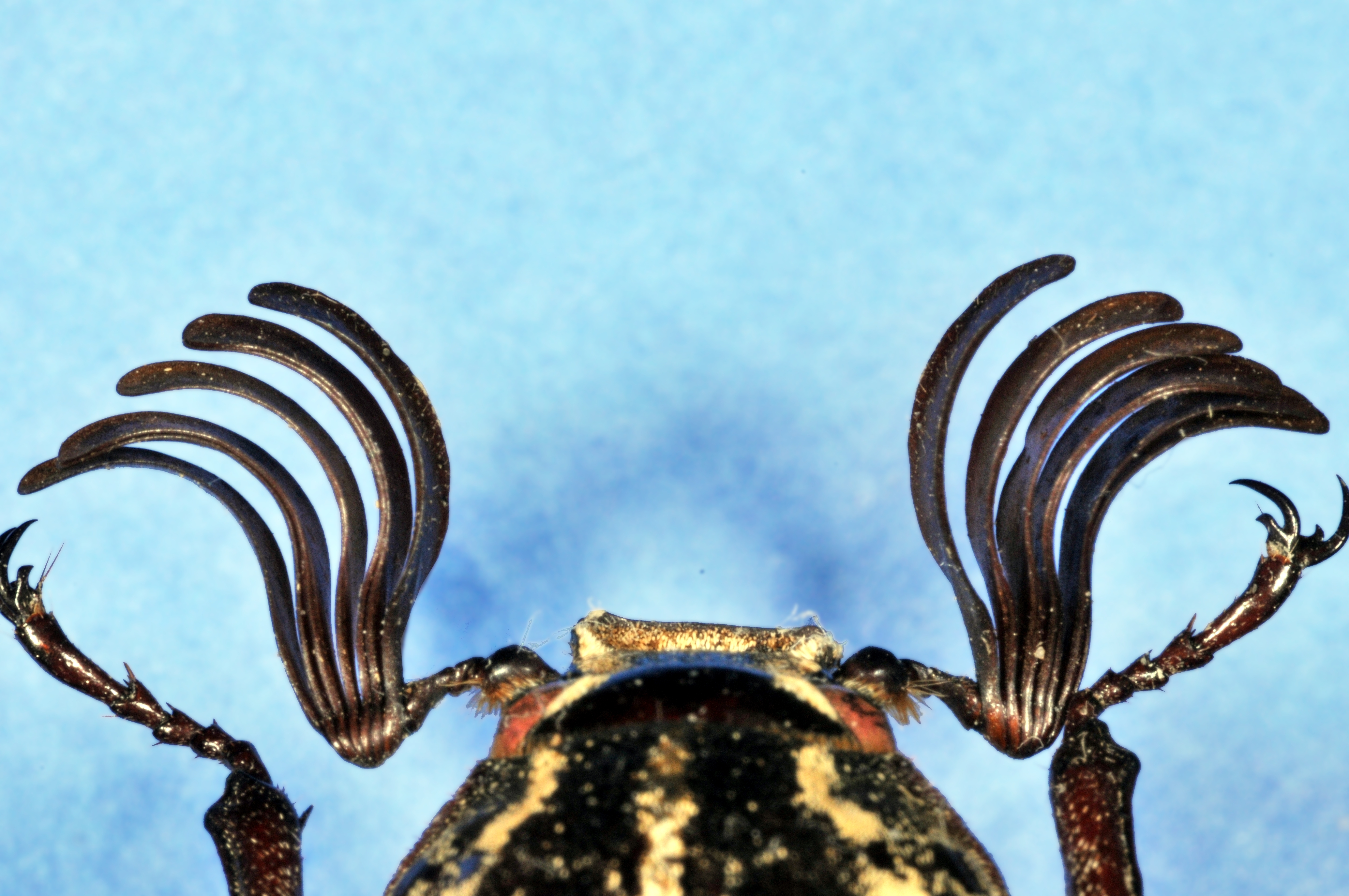 Polyphylla olivieri Flug, Coll. Geller-Grimm im Museum Wiesbaden, Deutschland